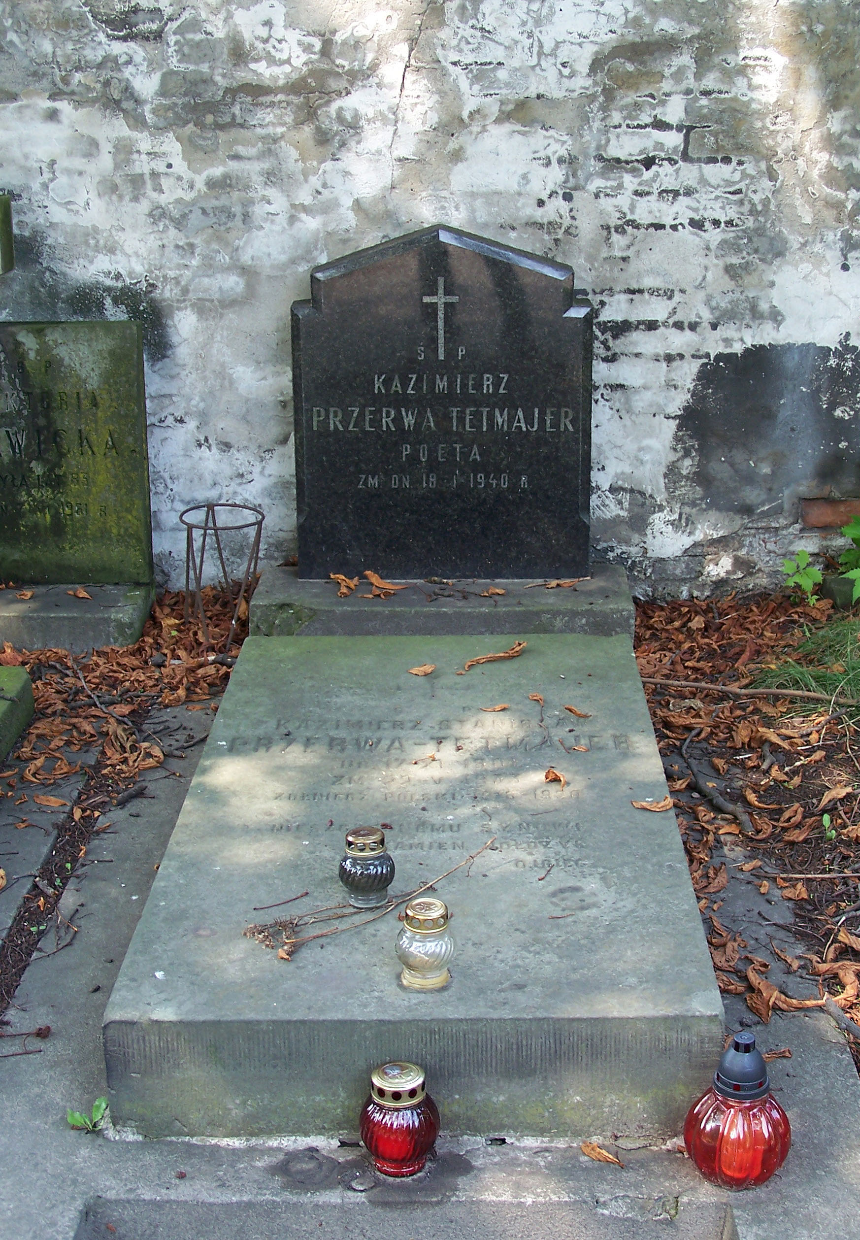 Grave of poet Kazimierz Przerwa-Tetmajer at Powązki Cemetery in Warsaw, Poland